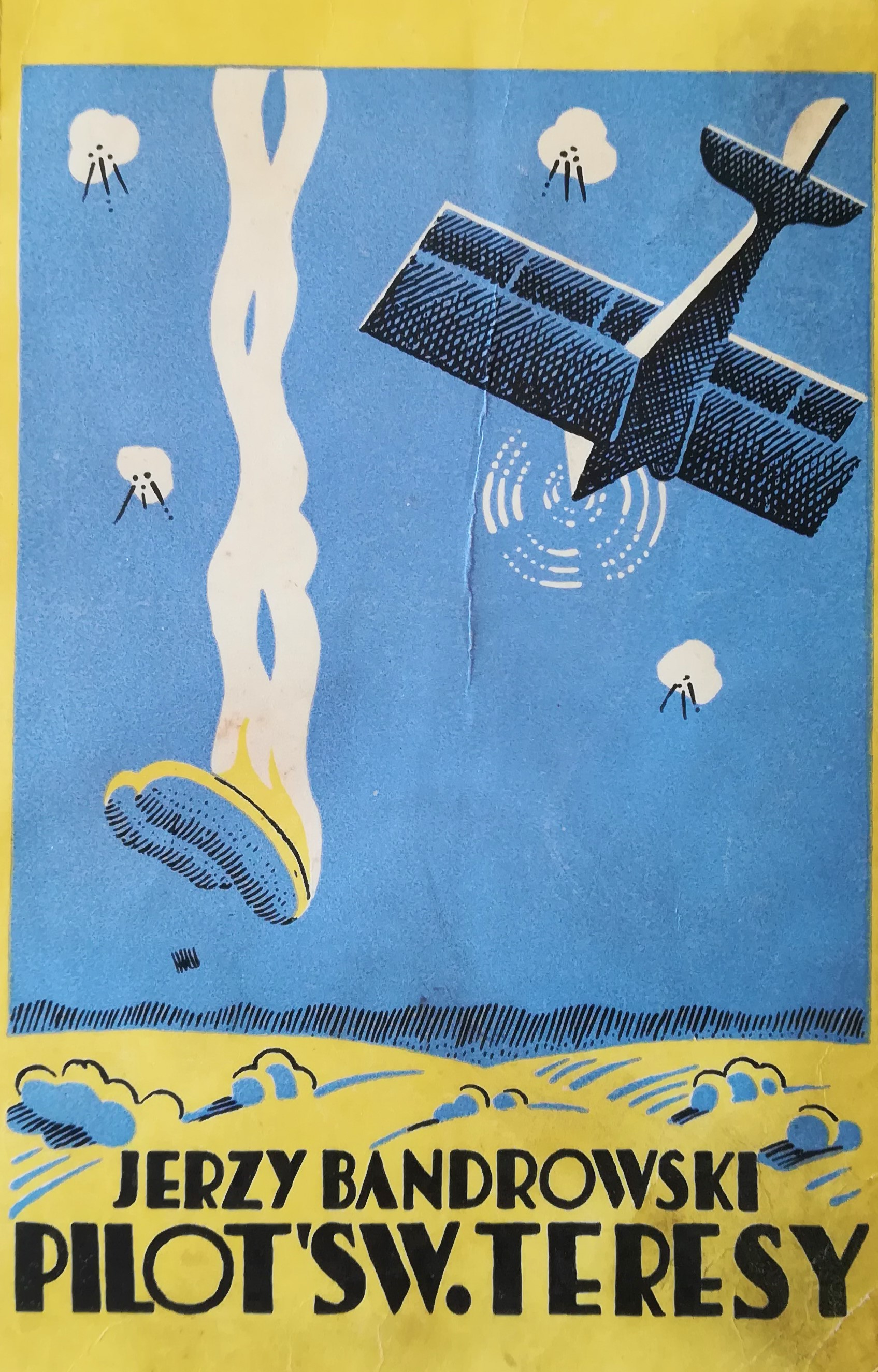 Jerzy Bandrowski, "Pilot św. Teresy" przed 1939 r.